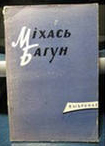 Вокладка кнігі М. Багуна